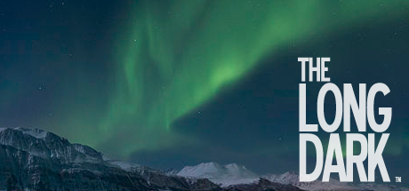 Ett exempel på hur The Long Darks logotyp skulle kunna ha sett ut. Bakgrunden är tillgänglig under licensen Creative Commons Erkännande-Dela Lika 3.0 Generisk och skapad av Ximonic (Simo Räsänen), och teckensnittet är fritt att använda.